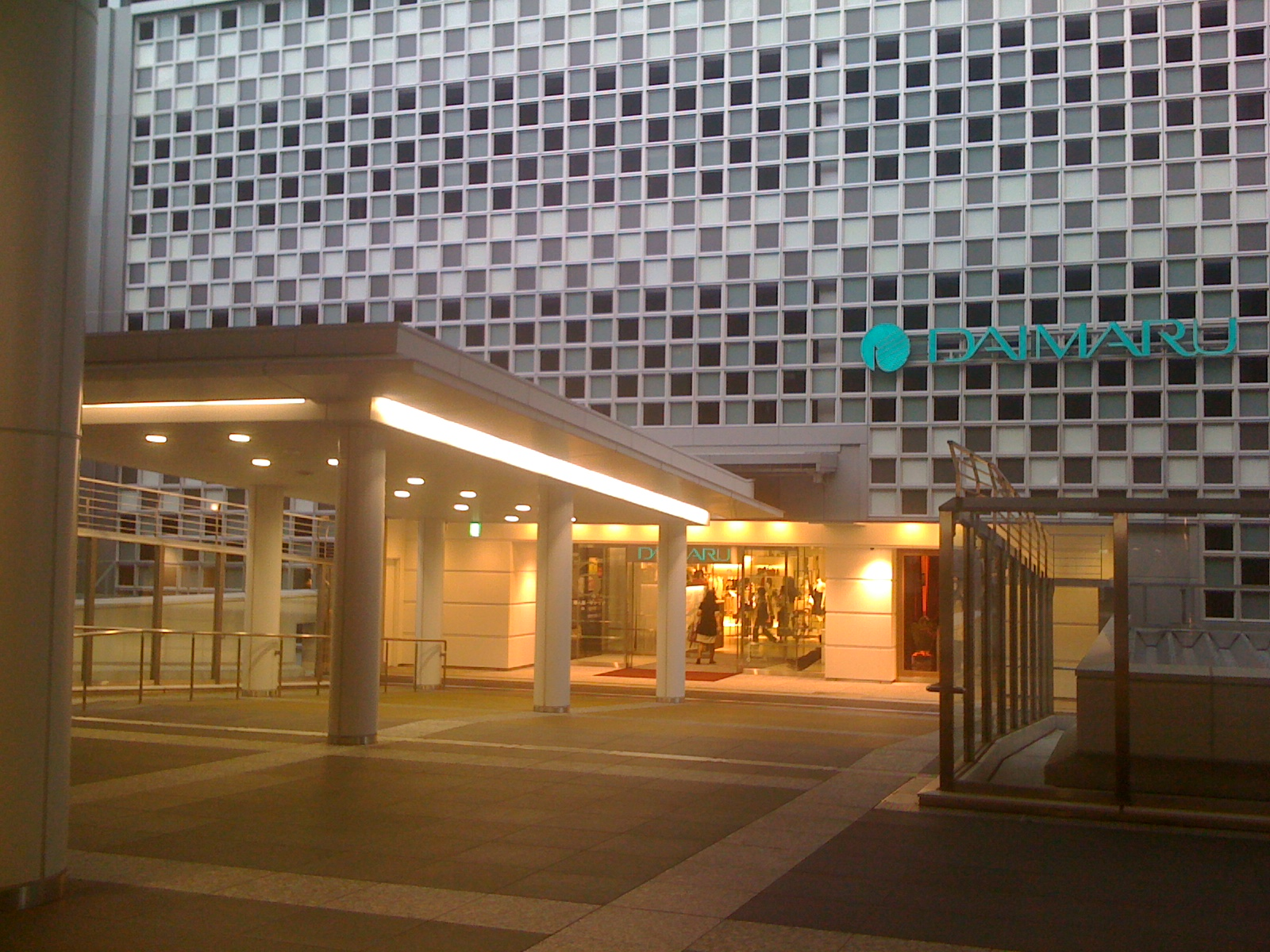 大丸梅田店（時空の広場から撮影）